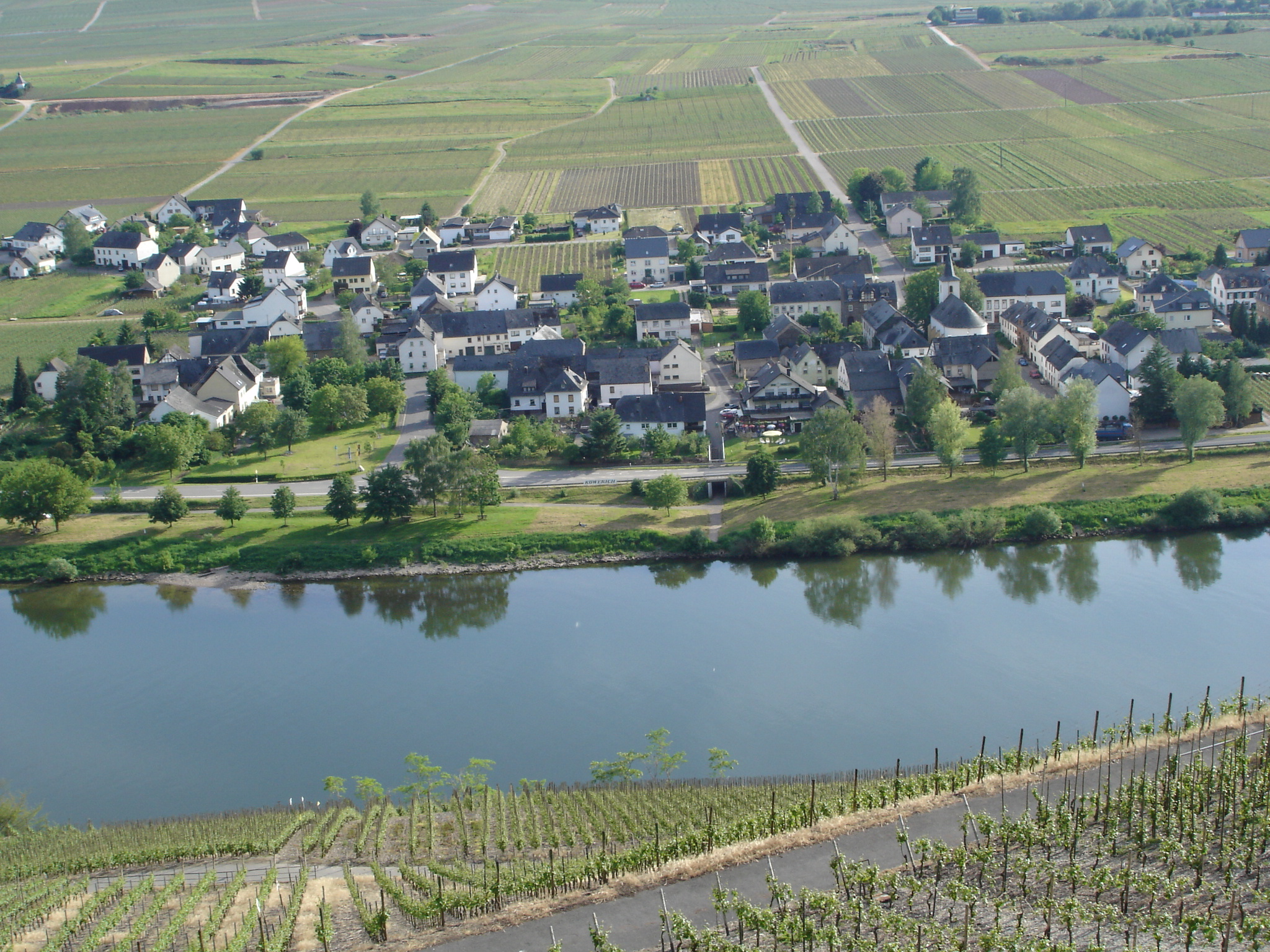 Köwerich von linken Ufer des Mosels